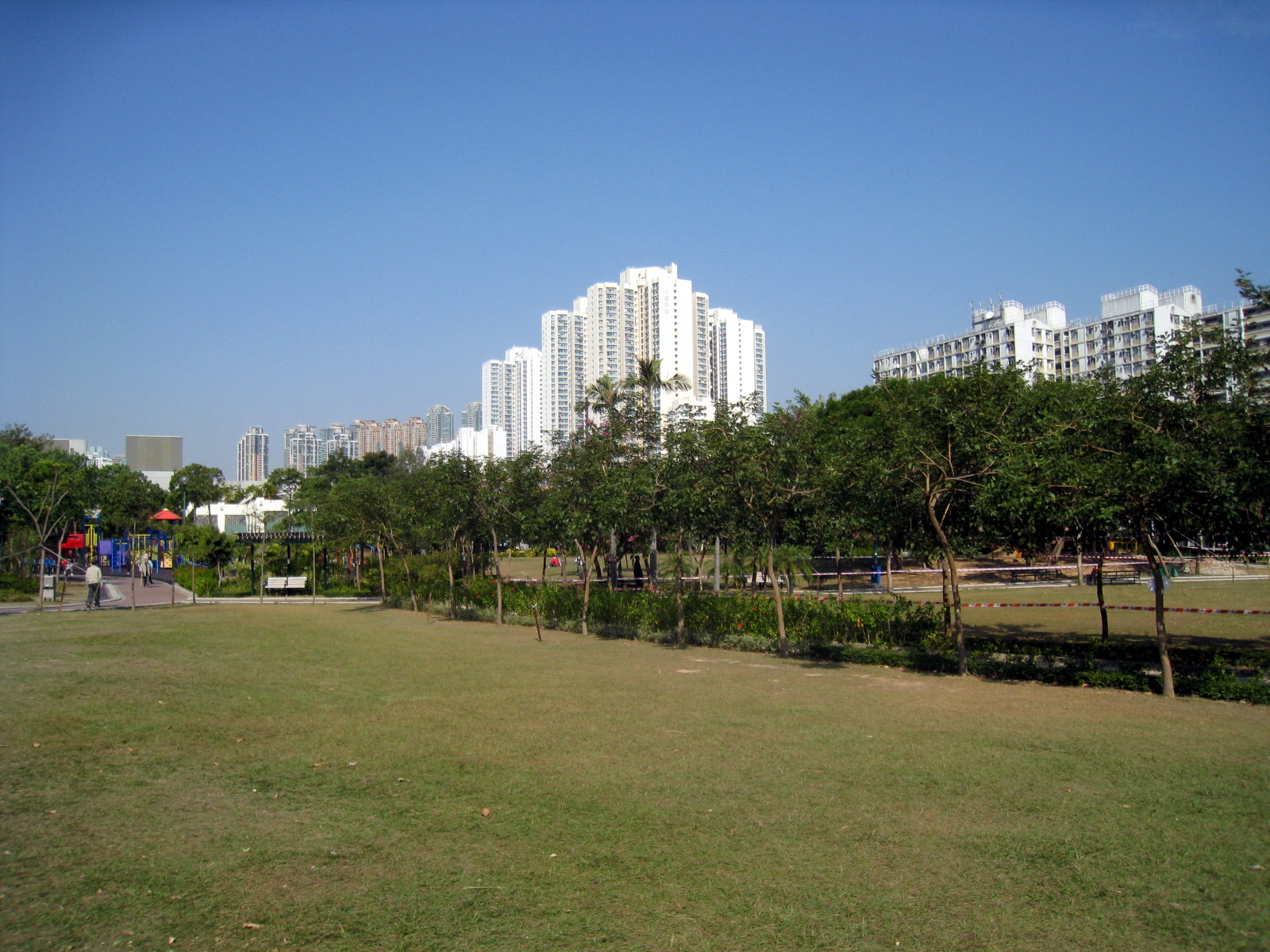 Nam Cheung Park